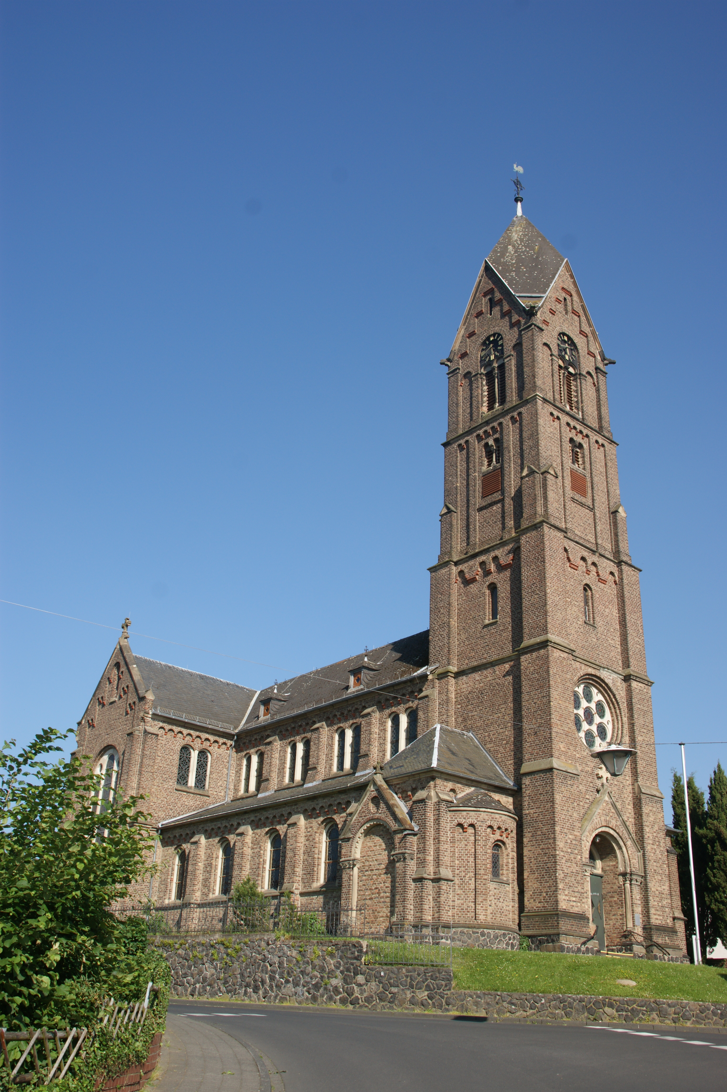 Katholische Kirche Heiliger Schutzengel in Dattenberg, Architekten: Carl Rüdell und Richard Odenthal